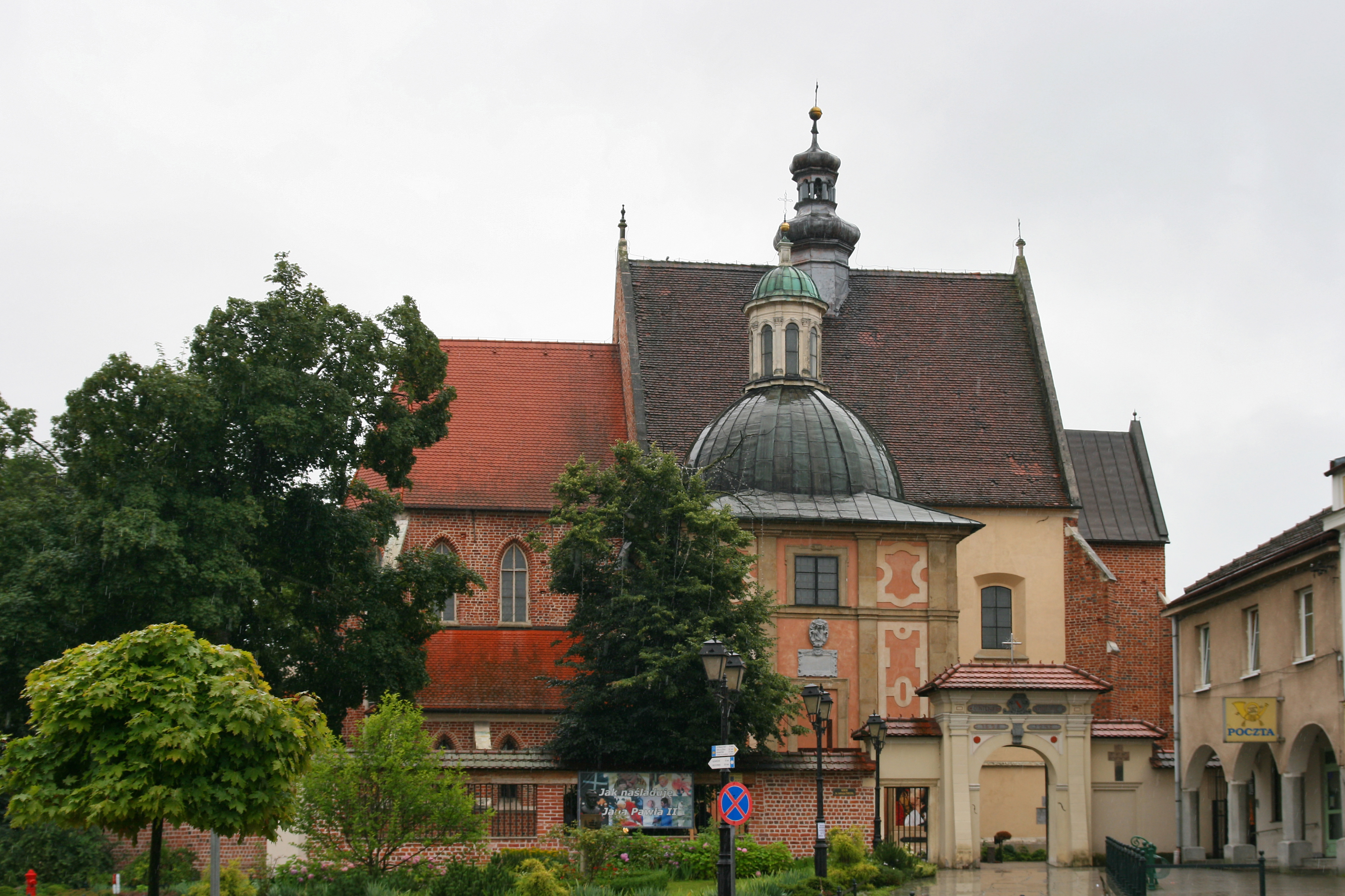 Kościół pw. Dziesięciu Tysięcy Męczenników w Niepołomnicach.